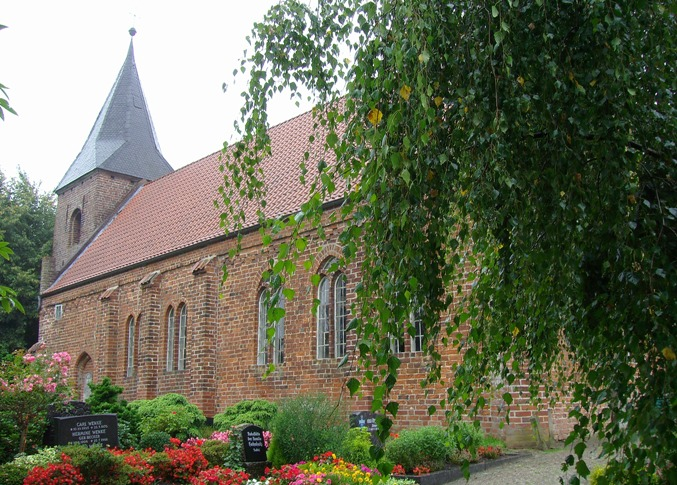 Marienkirche in berne, OT Neuenhuntorf